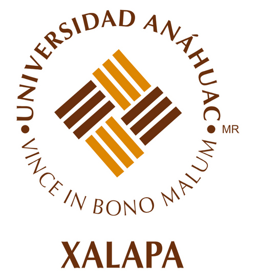 Universidad Anáhuac Xalapa